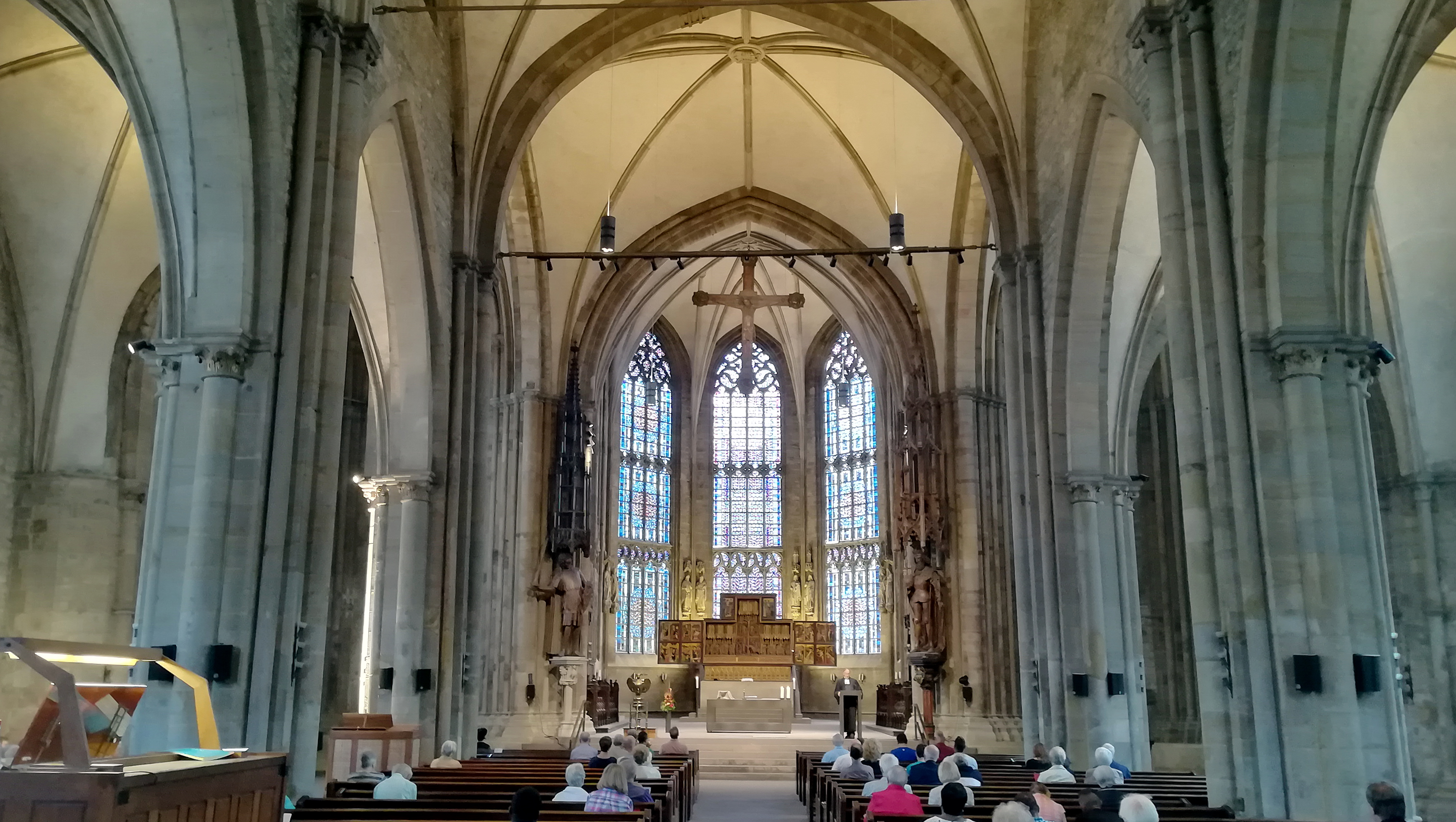 St. Reinoldi, auch Reinoldikirche, ist eine evangelische Kirche in der Dortmunder Innenstadt.